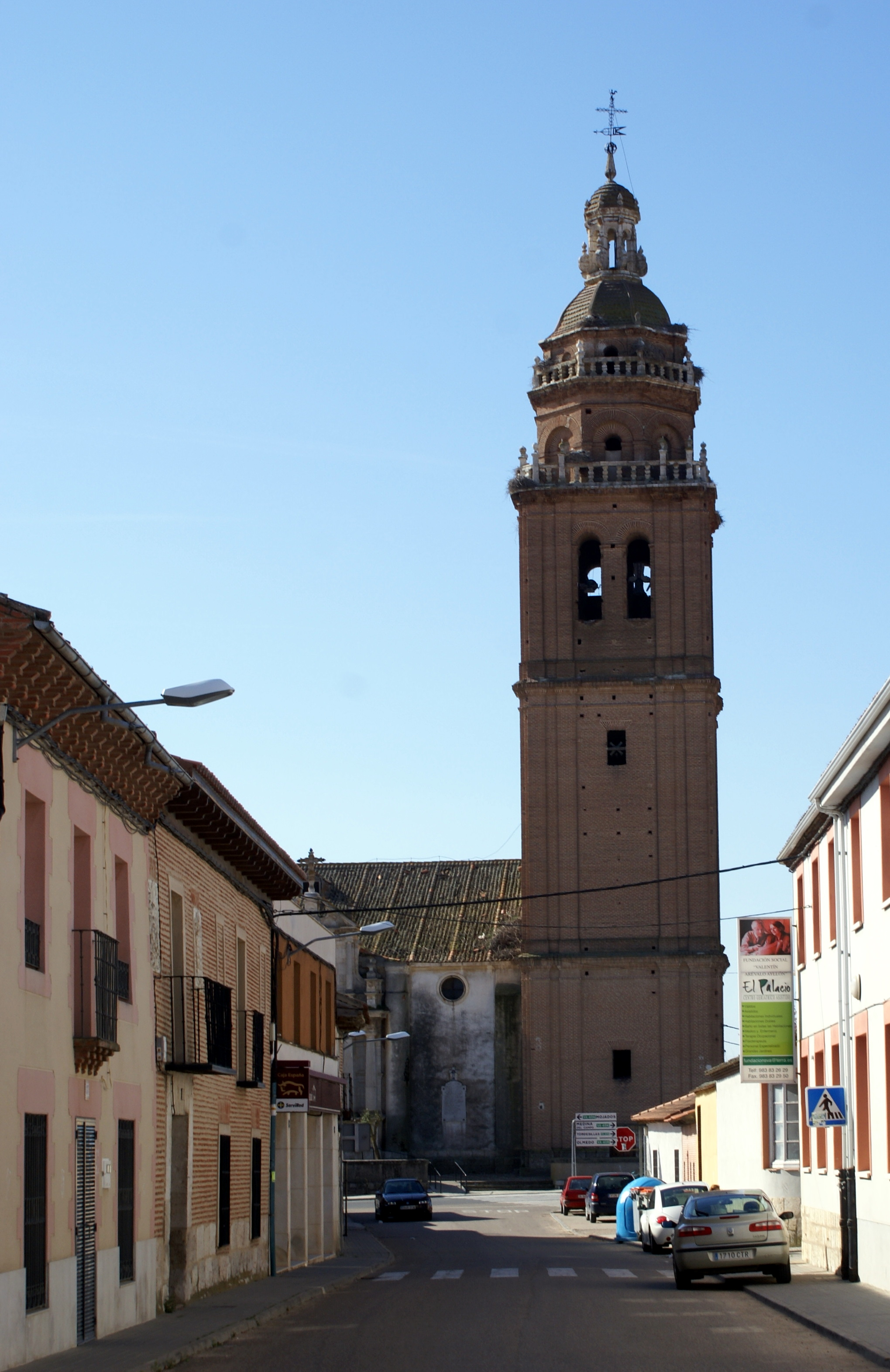 Iglesia de Santa María Magdalena de Matapozuelos desde la calle Valentín Arévalo Ayllón del pueblo, provincia de Valladolid, España.